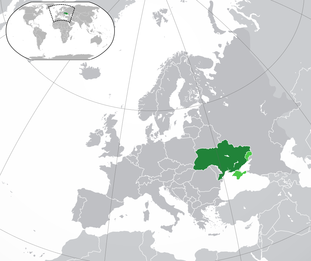 Зеленый: Украина Салатовый: территории не контролируемые Серый: Европа Светло-серый: окружающий регион